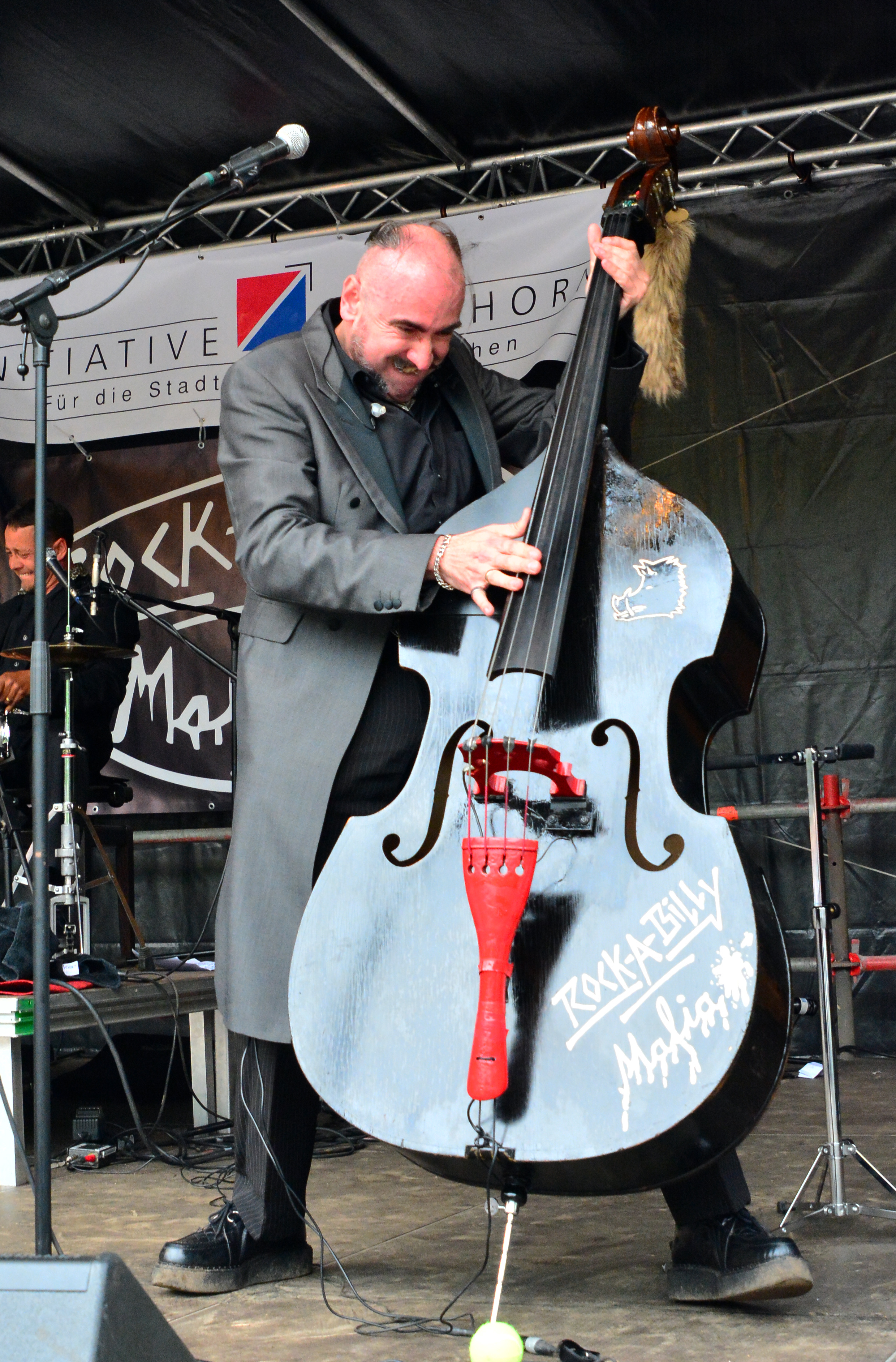 Rockabilly Mafia beim „Jazz 'n Roses 2015“ im Liether Rosengarten Elmshorn